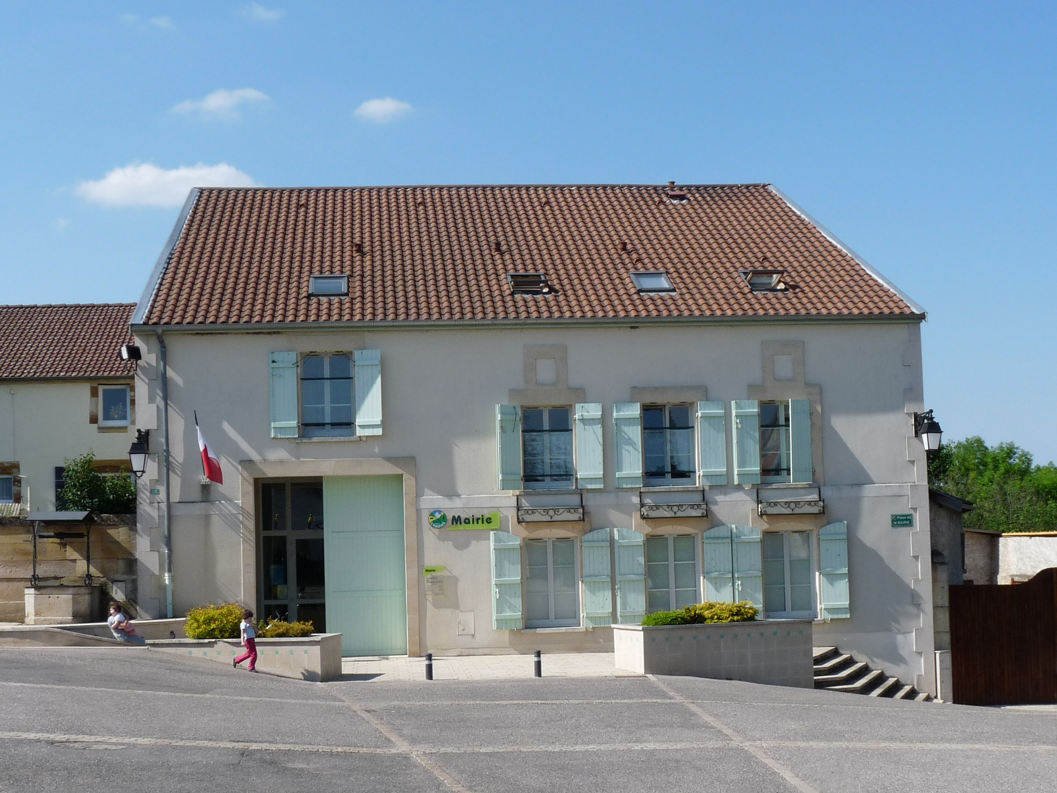 Mairie de Combles-en-Barrois (Meuse).